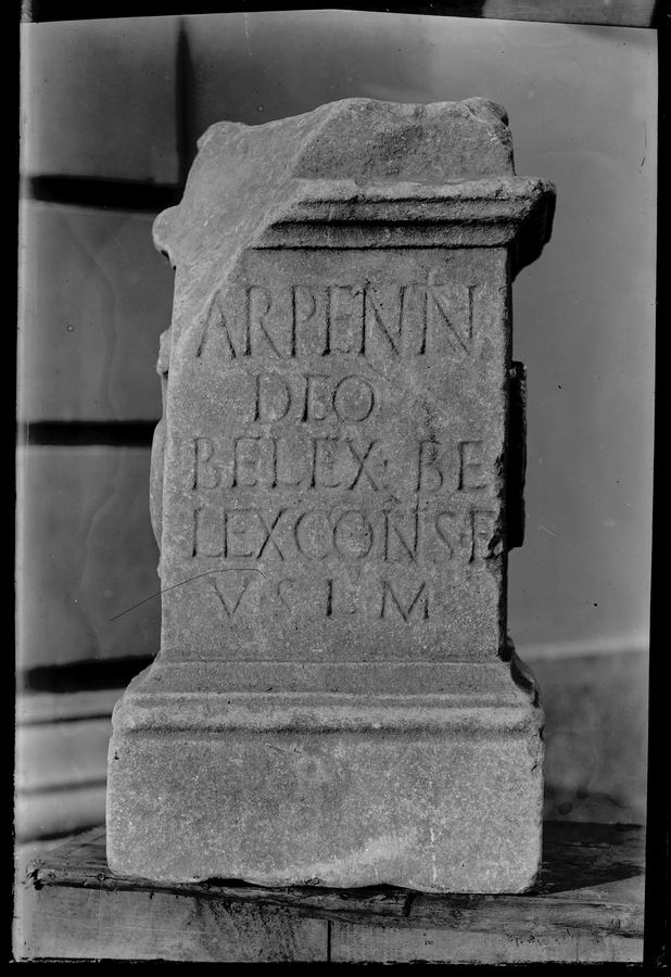 Bagnères-de-Luchon (Haute-Garonne). Entre 1872 et 1907. Vue de détail d'un autel votif de l'époque romaine, appartenant à la collection de Maurice Gourdon. De face, bloc de pierre rectangulaire, face principale inscription gravée sur 5 lignes "ARPENN DEO BELEX BE LEXCONSE VSLM".